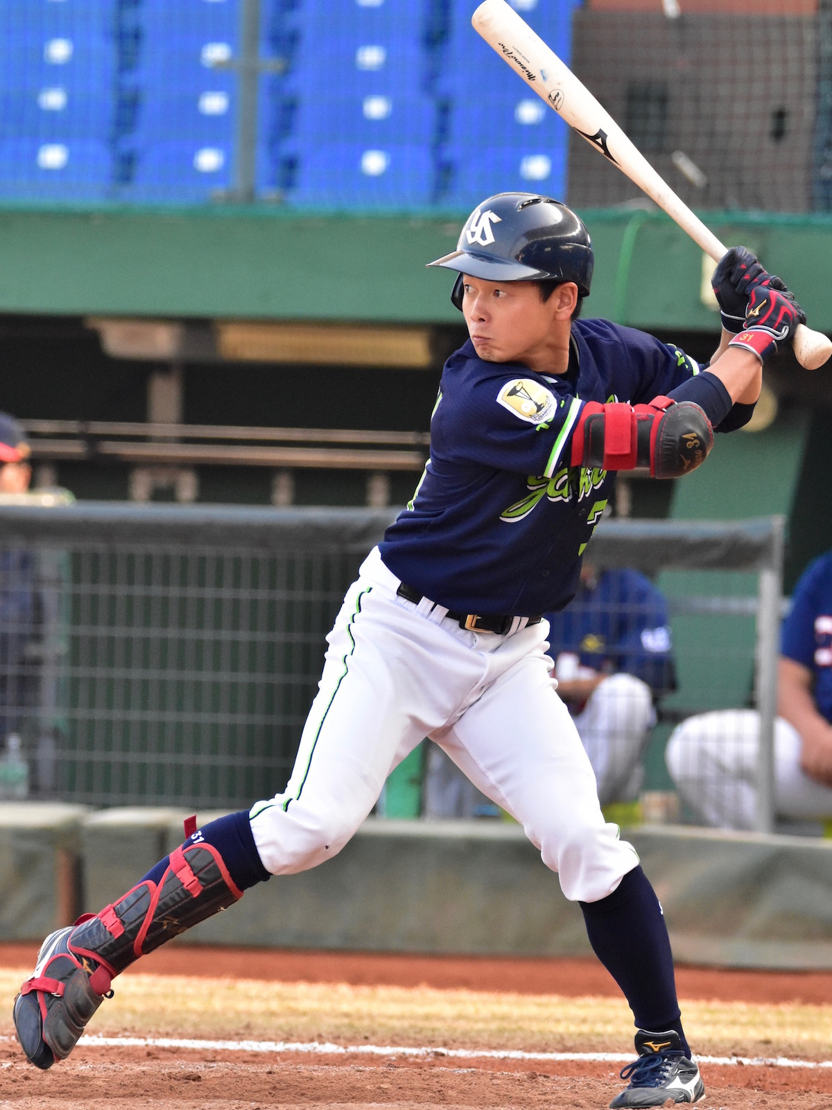 2016年12月17日台中インターコンチネンタル球場にて